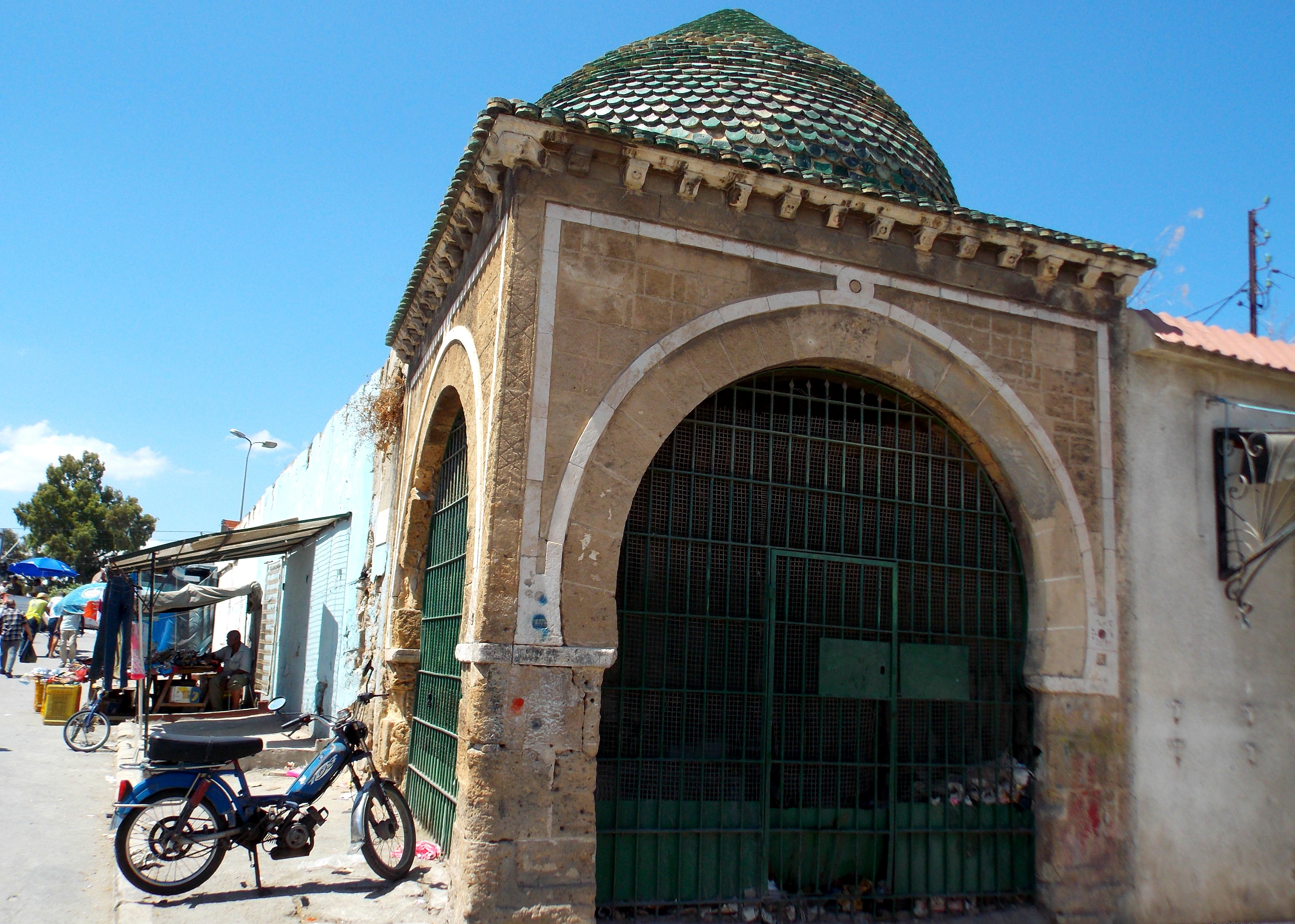 Fontaine à coupole située près de Sidi-Abd-Esselam, Tunis